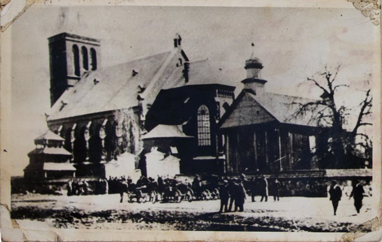 Беларуская (тарашкевіца): Альковічы (Alkovičy). Стары і новы касьцёлы